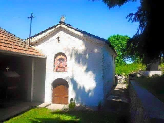 Црква пресвете Богородице у селу Готовуша, општина Штрпце, Србија